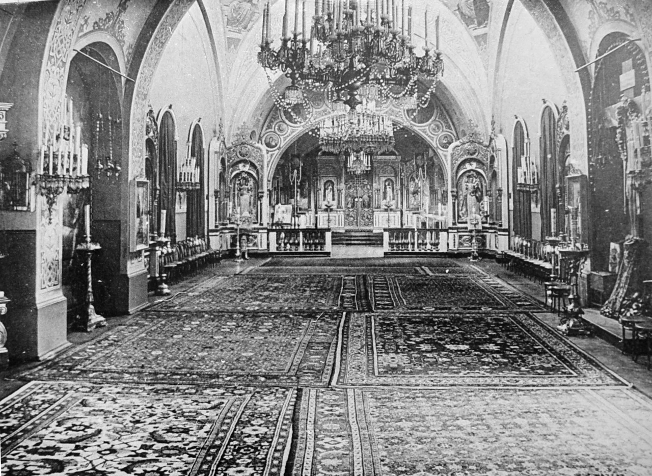 Внутреннее убранство Церкви во имя Преображения Господня при Первой Санкт-Петербургской классической гимназии. Фотография из фонда музея 321-ой школы Санкт-Петербурга.